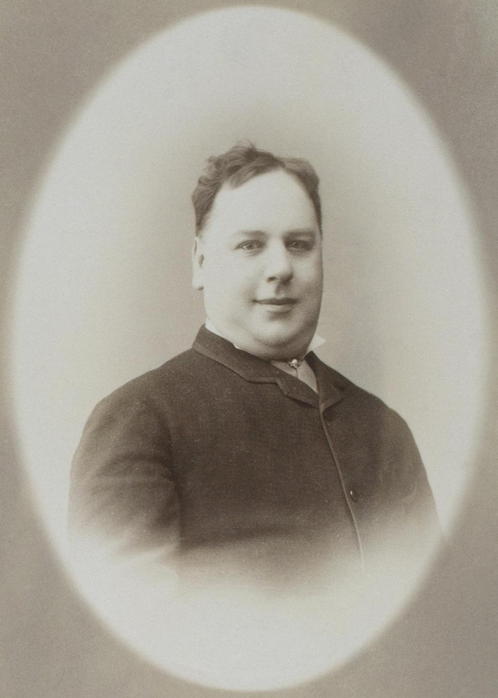 Портрет актера Константина Александровича Варламова. Фотография: альбуминовый отпечаток. 16,5х10,5 см